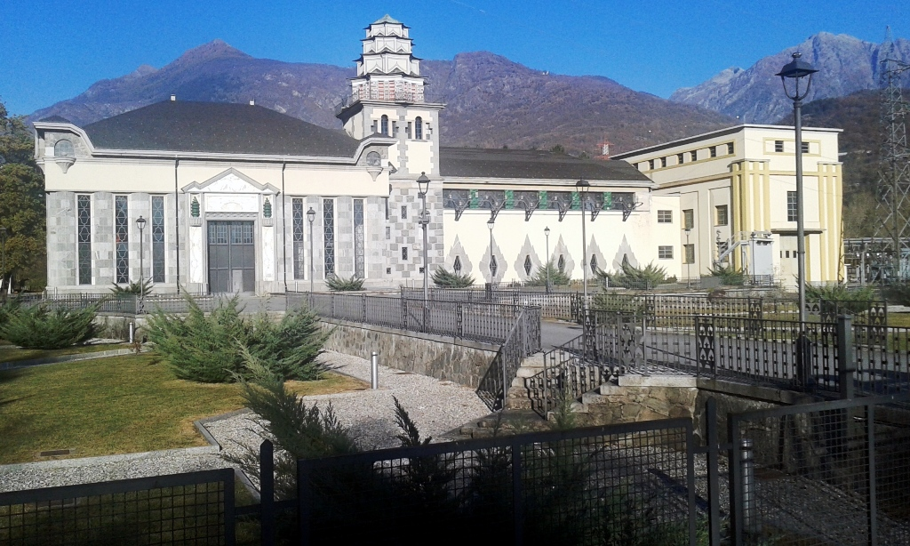 Centrale Crevola Toce. Progettata da Piero Portaluppi e costruita nel 1925. Nel 2017 è stata raffigurata su un francobollo commemorativo di Portaluppi.